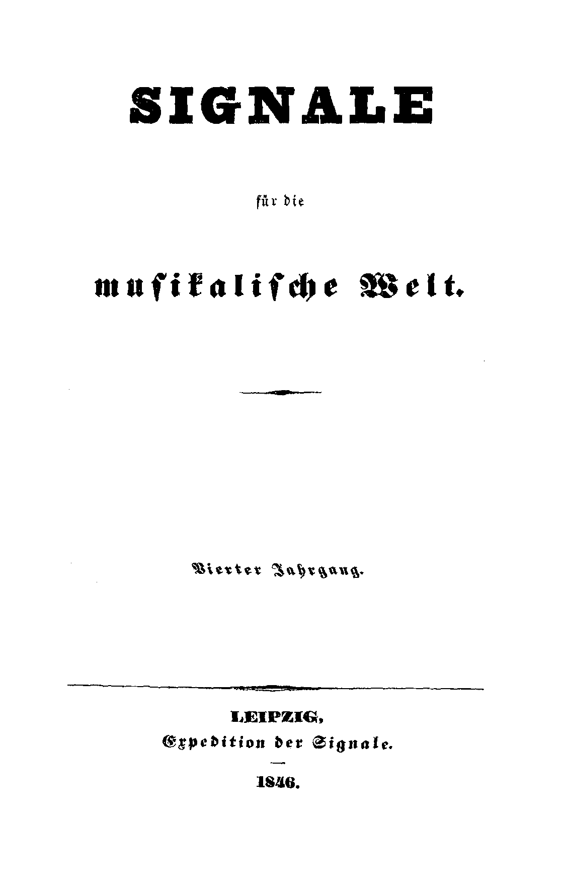 Titelseite der Zeitschrift / Title page of the periodical